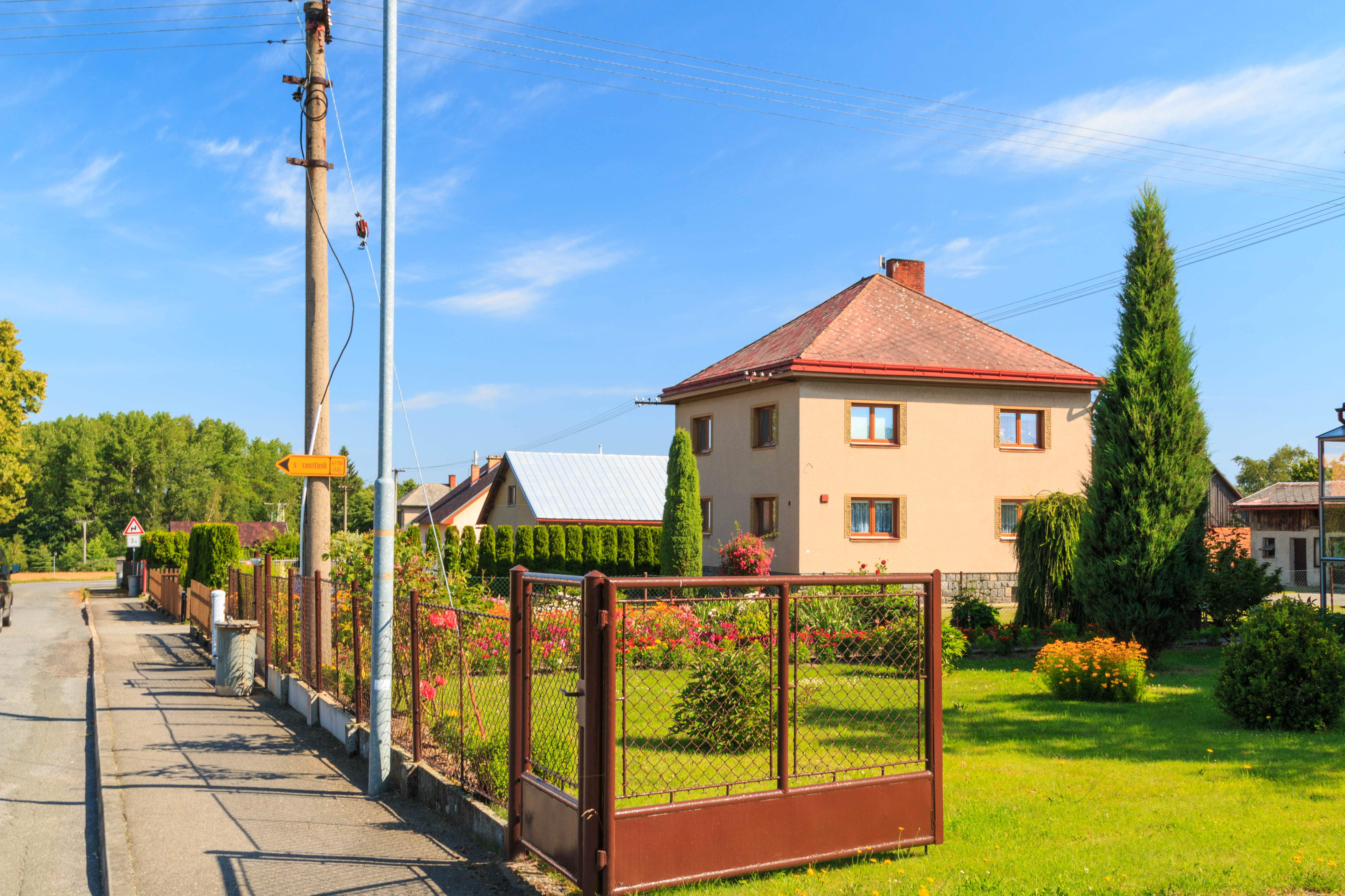 Marieves čp. 4